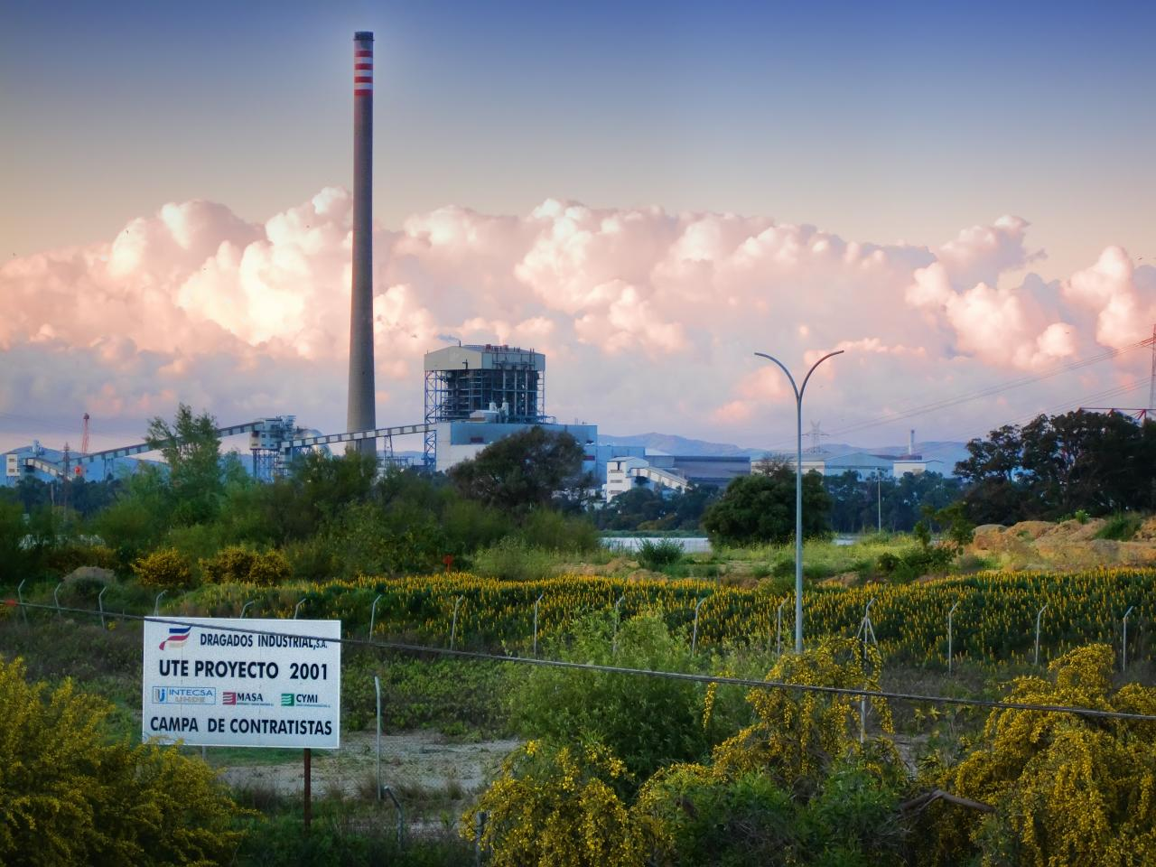 Central térmica de los Barrios, en la localidad homónima de la provincia de Cádiz, en España.